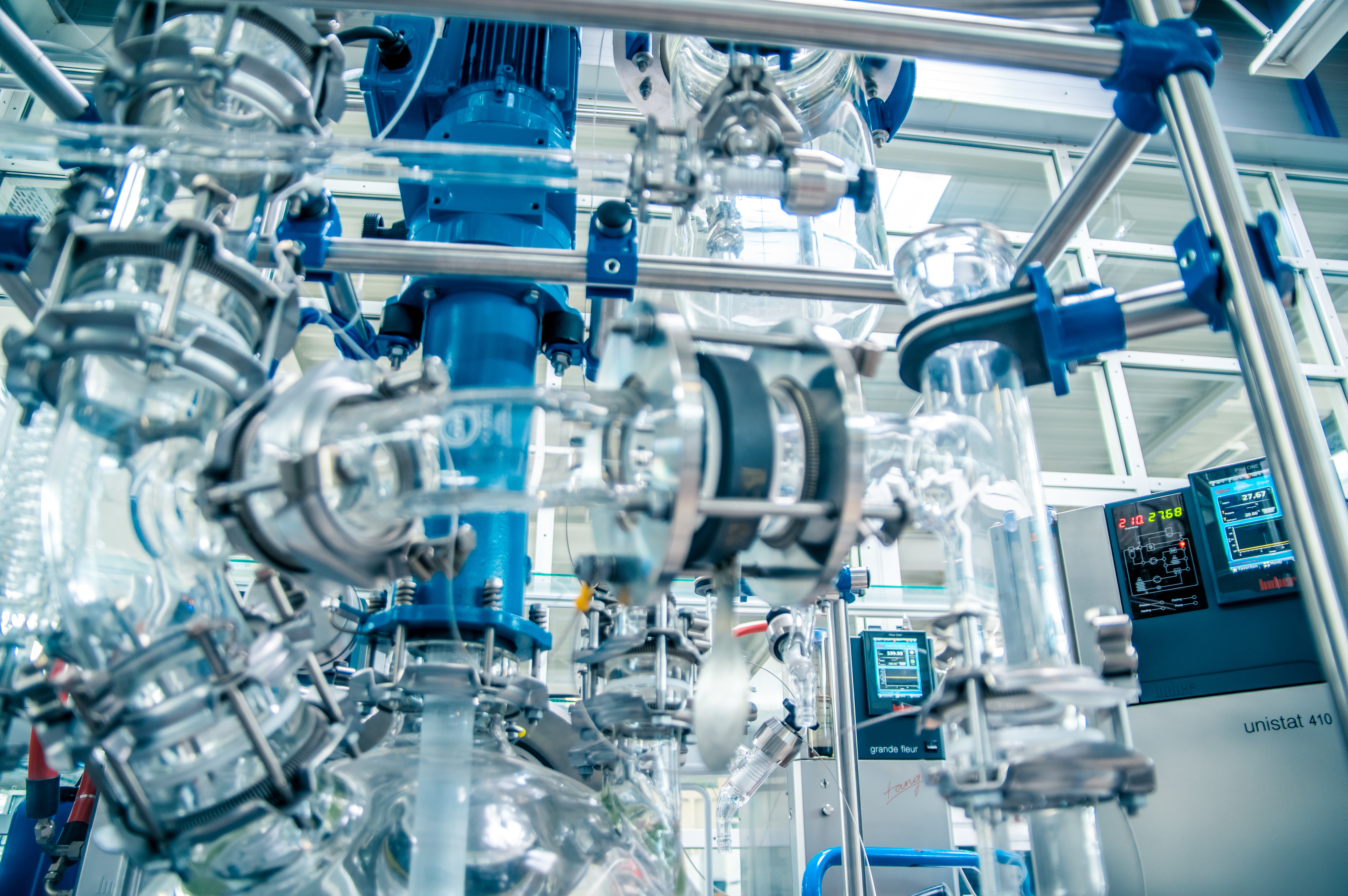 Reaktorsystem für die chemische Prozesstechnik mit Unistat Temperiersystem von Huber Kältemaschinenbau